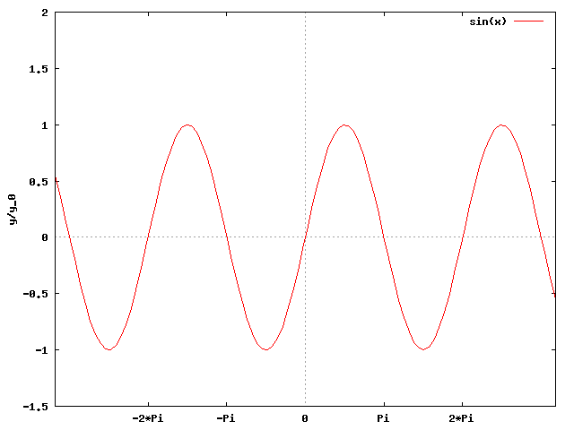 Sinusfunktion